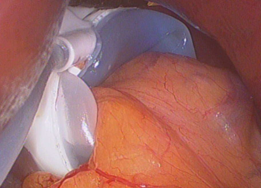 위밴드수술후 위상단부에 거치된 존슨앤존슨밴드